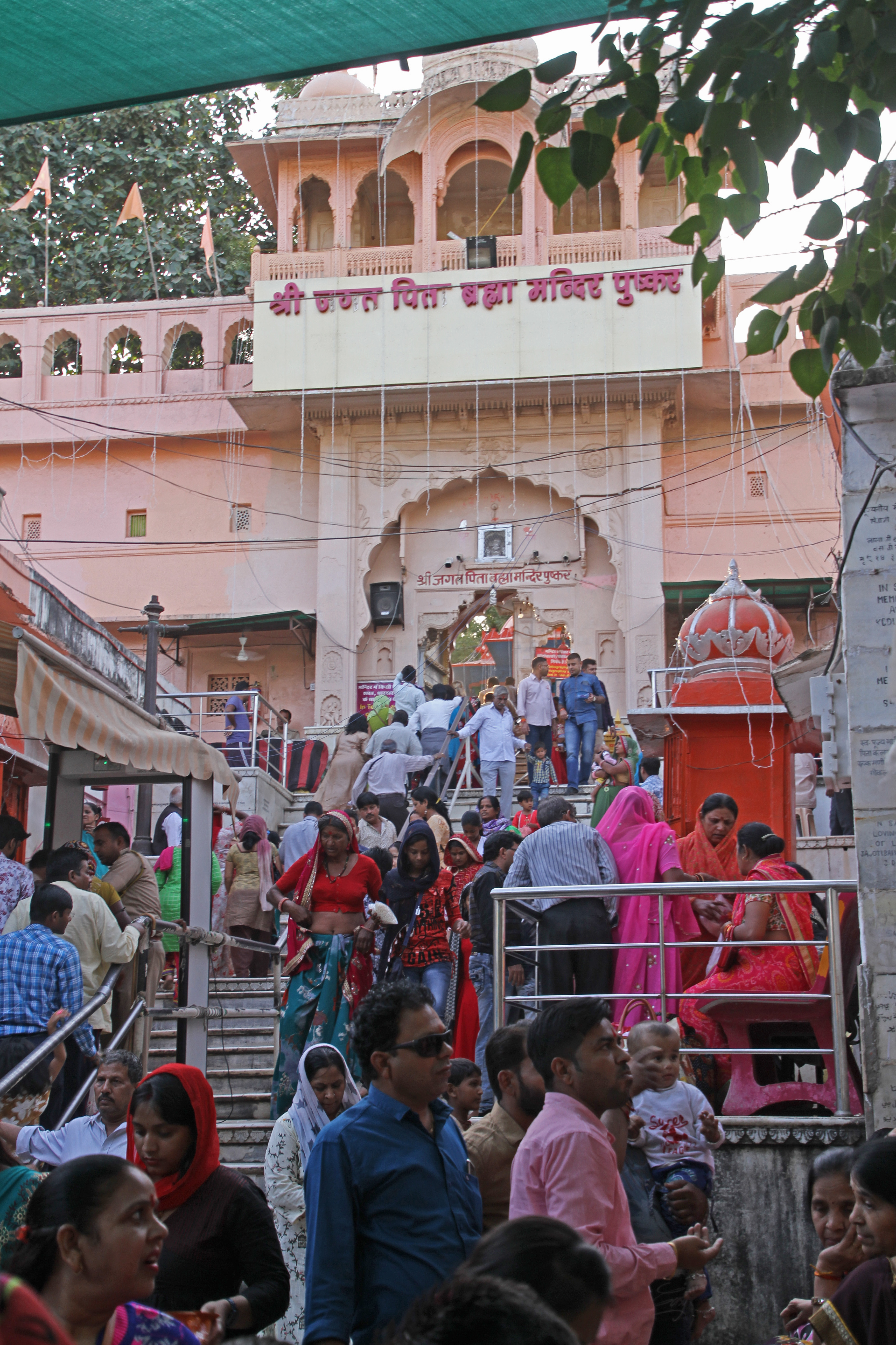 Pushkar